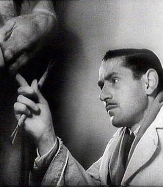 Antonio Cano en el año 1942 en Granada, modelando la figura de Alonso Cano.